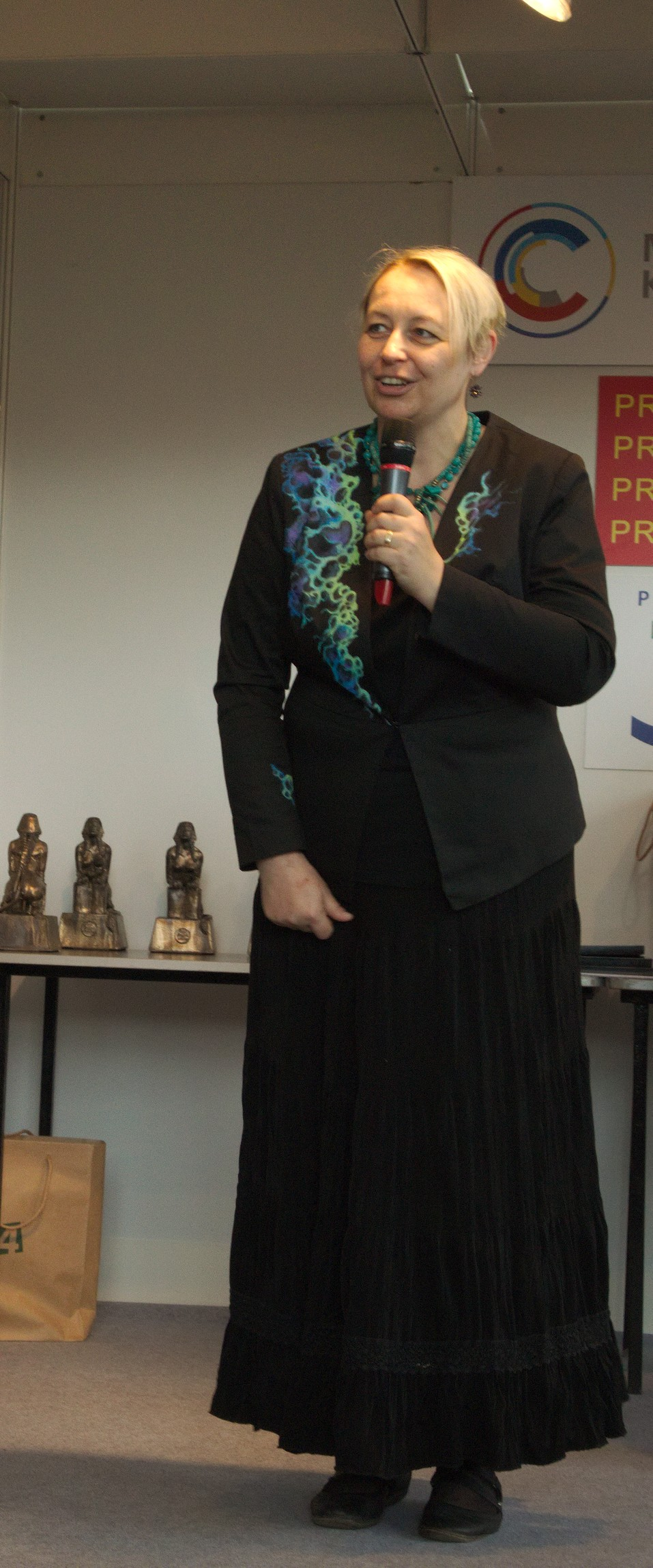 Vilma Kadlečková přebírá ocenění Akademie SFFH 2014 za původní českou nebo slovenskou knihu (Mycelium III: Pád do temnot)